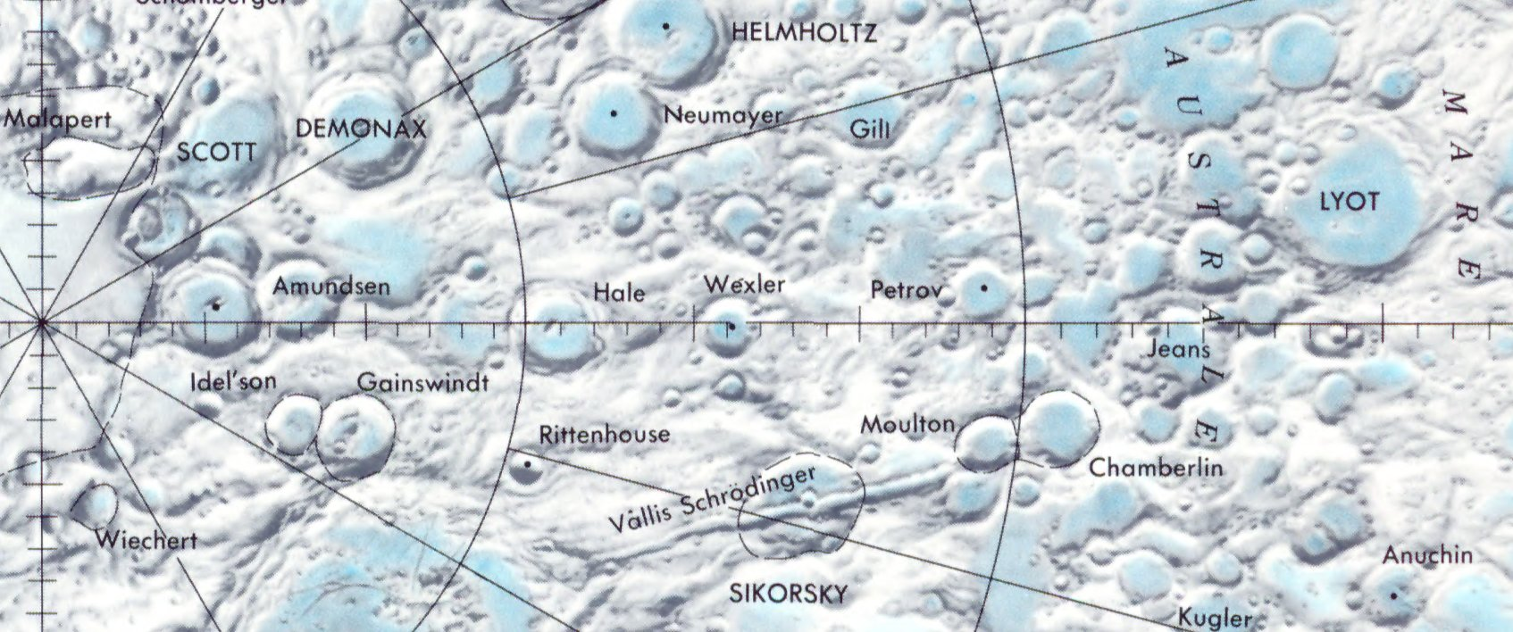 Cráter lunar . Localización. (Lunar Chart LPC1. Second Edition)